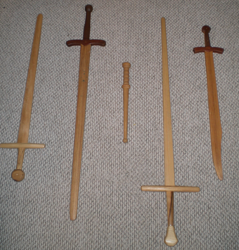 Waster